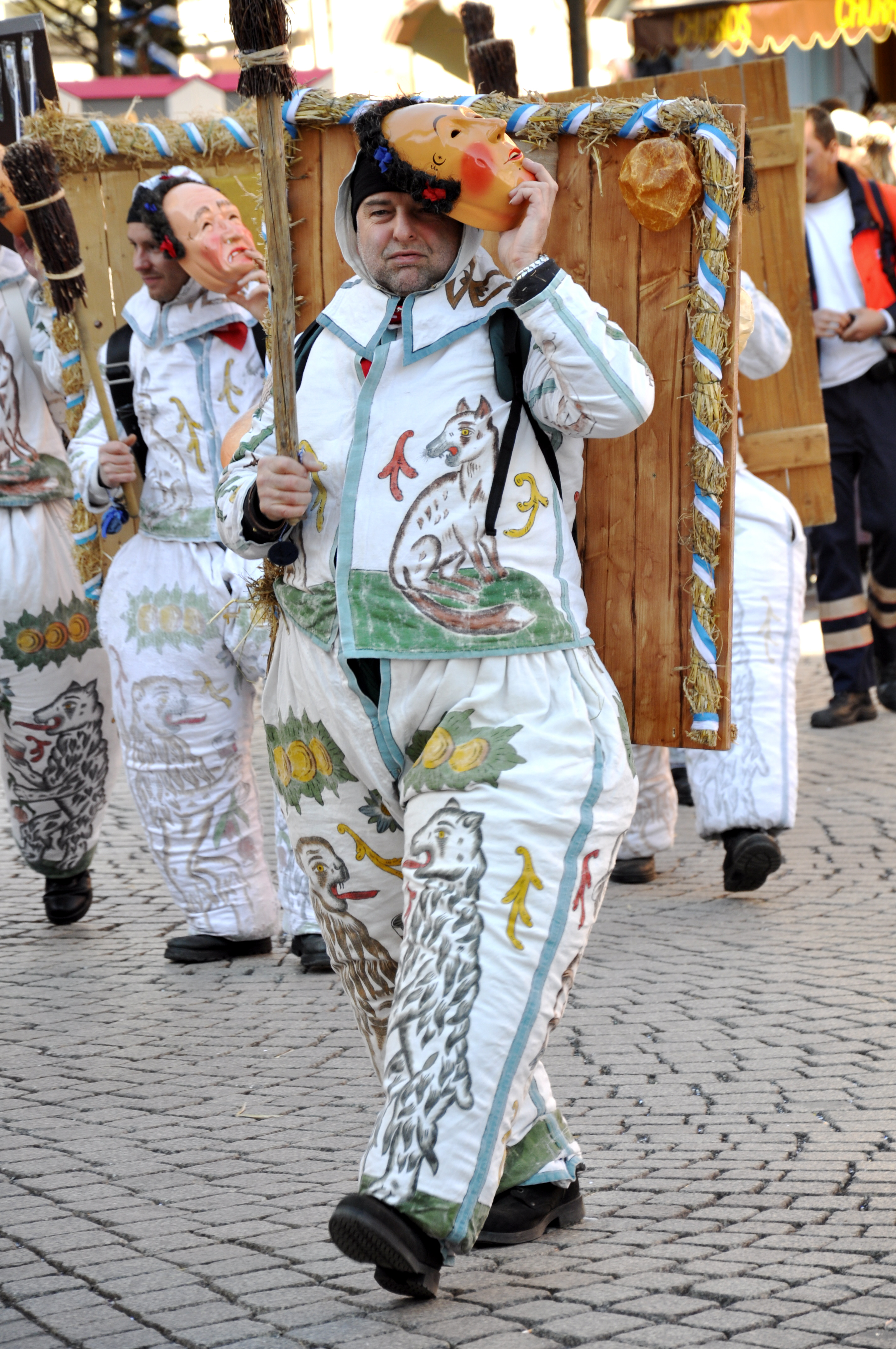 Fasnet in Villingen, Fasnetsmontag 2011 Narren der Narrozunft beim Maschgerelauf, Figur: „Wuescht“